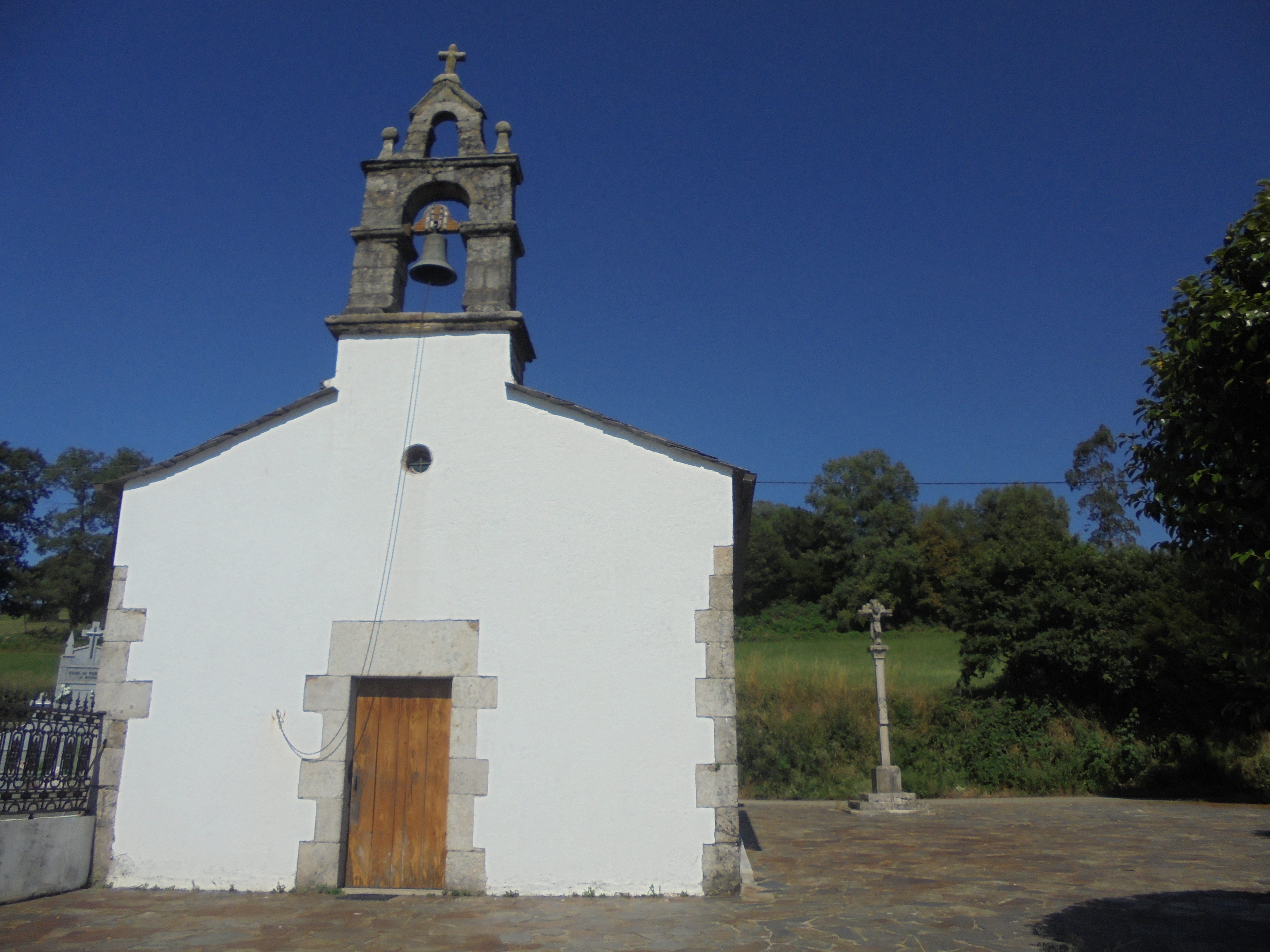 Igrexa parroquial da Braña ( Baleira)